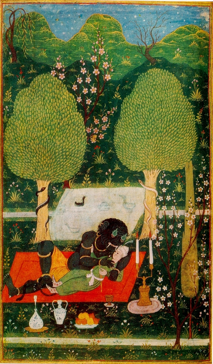 Махан в заколдованном саду. «Хамсе» Низами. Бухара, 1648 г. Санкт Петербург, РНБ.